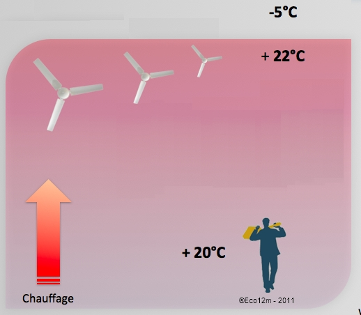 Températures homogènes après destratification